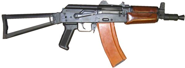 AK47U